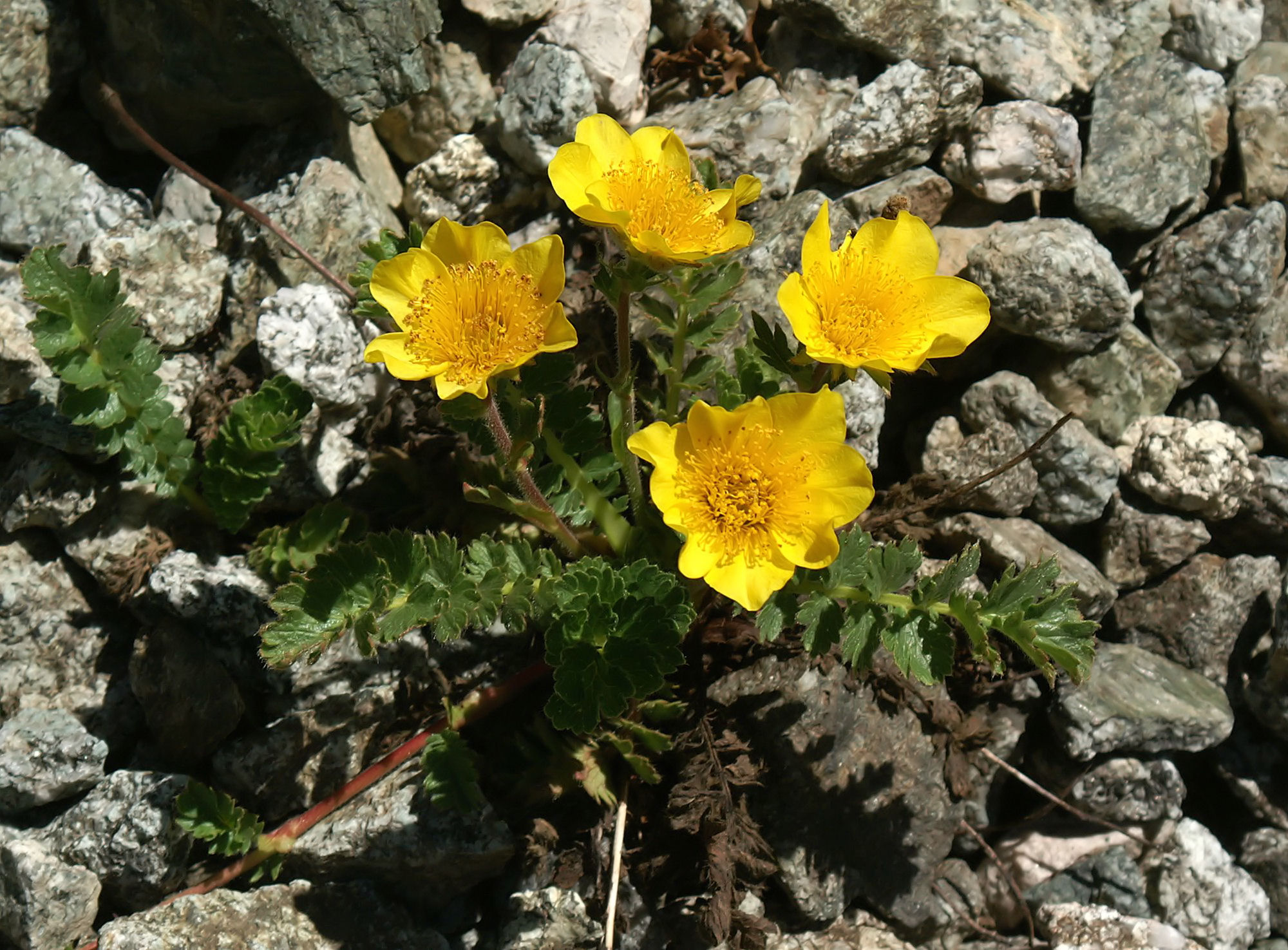 Geum reptans